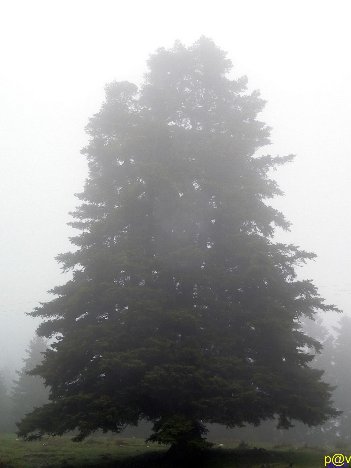 Κεδρος